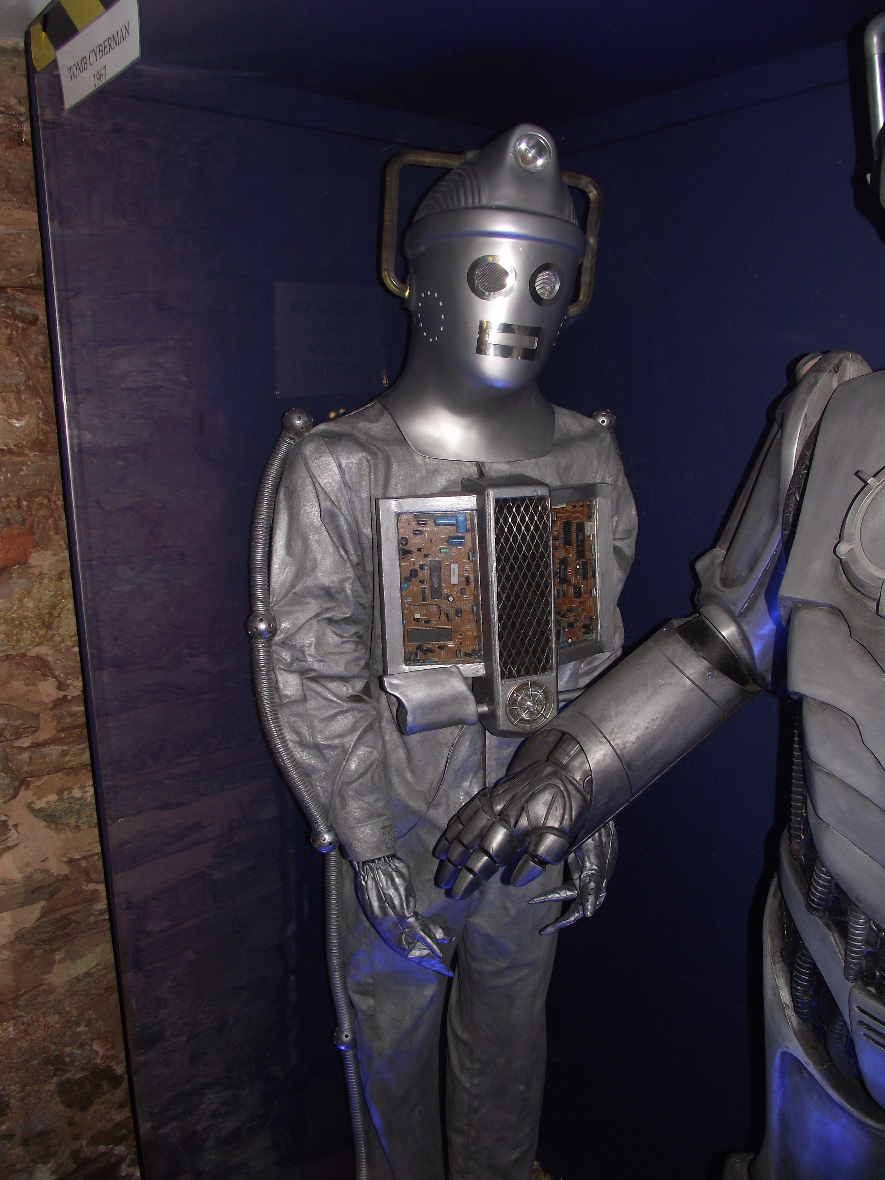 Cyberman Time Machine Museum